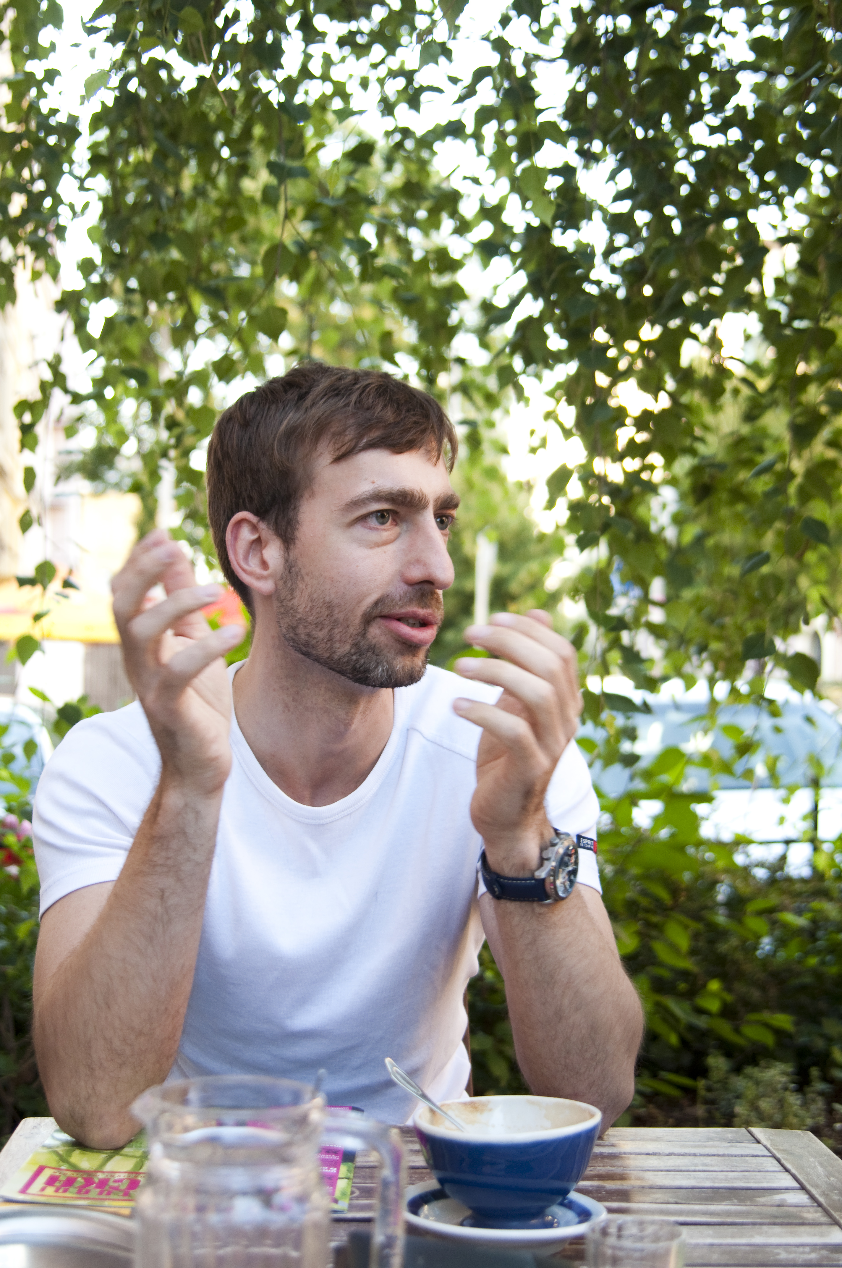 Michal Reynaud při rozhovoru pro časopis Kulturní pecka